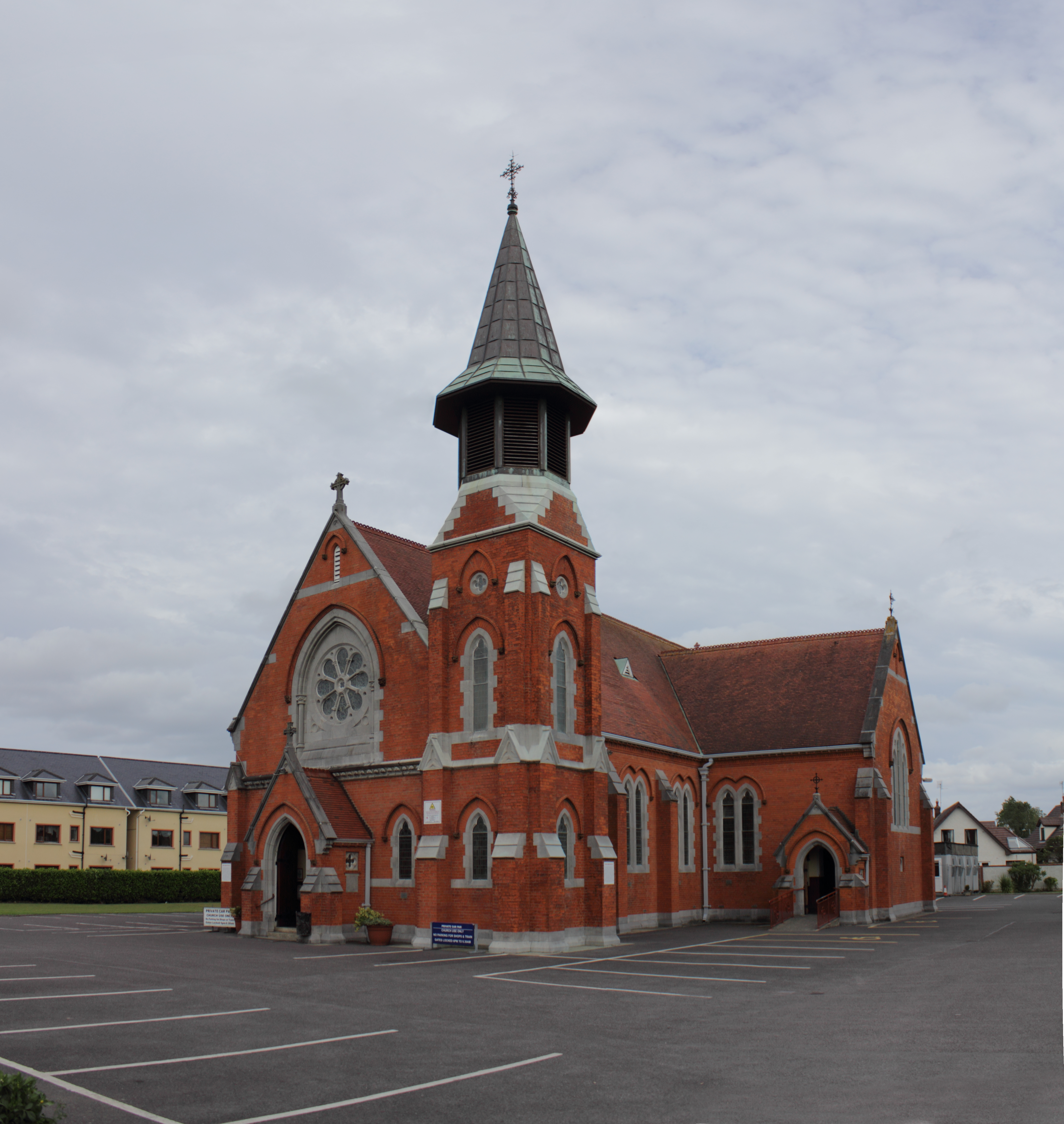 Eglise Saint Patrick (catholique) de Donabate, en Irlande 2 photos assemblées par Hugin